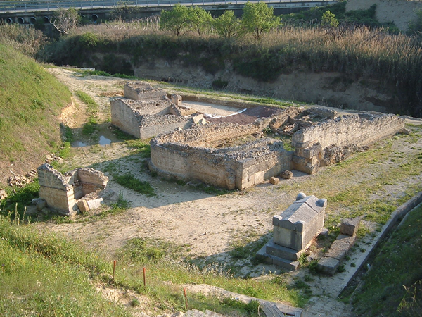 Necropoli di Santa Sofia